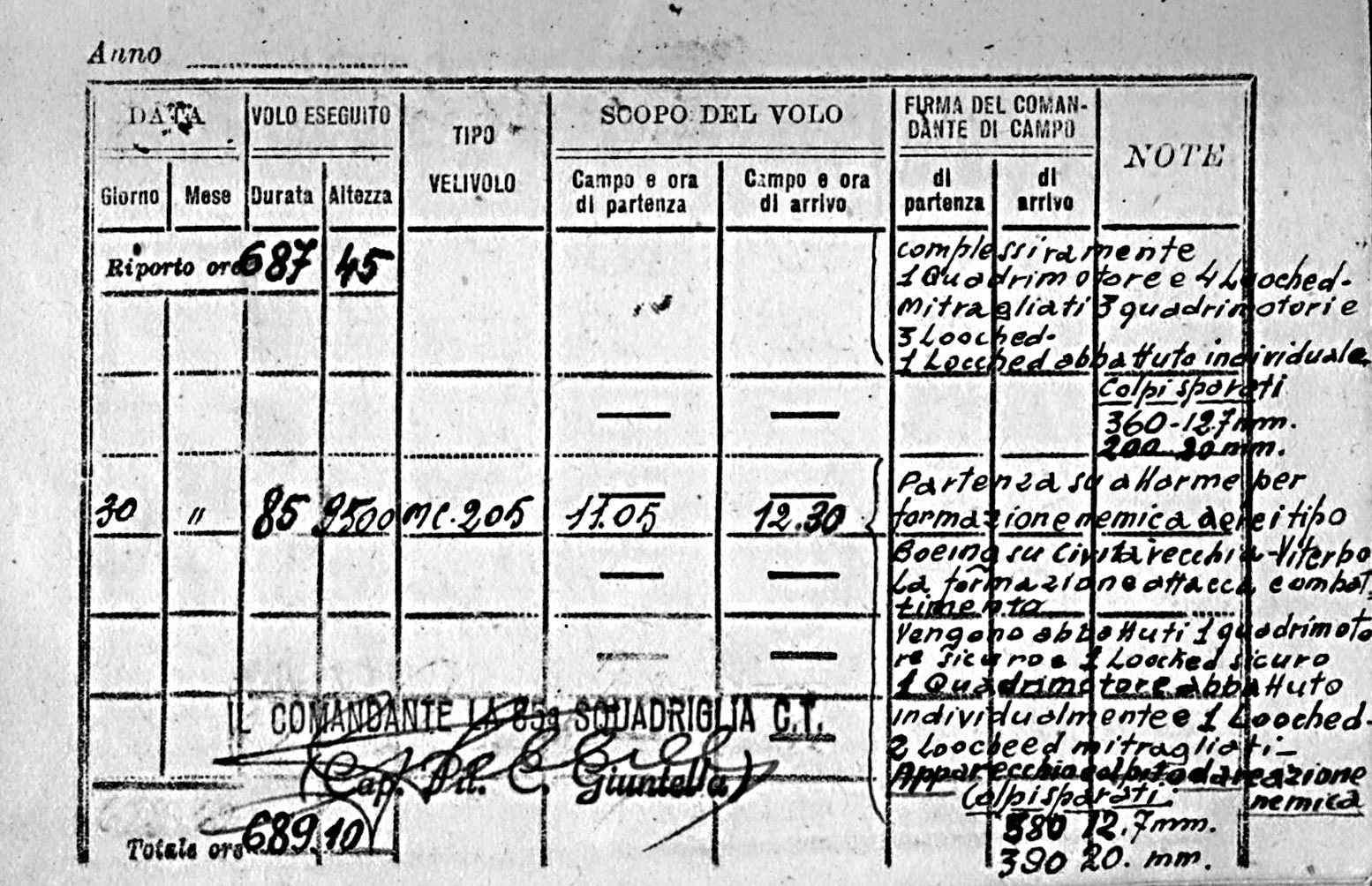 Pagina del libretto di volo di Guido Fibbia risalente al giugno 1943